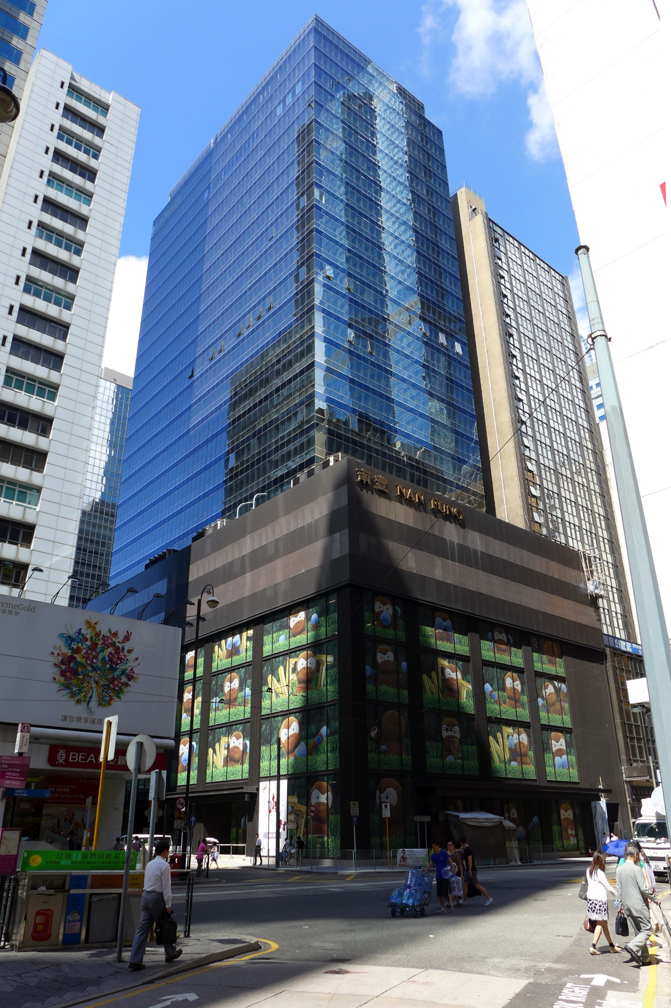 Nan Fung Tower, Central, Hong Kong